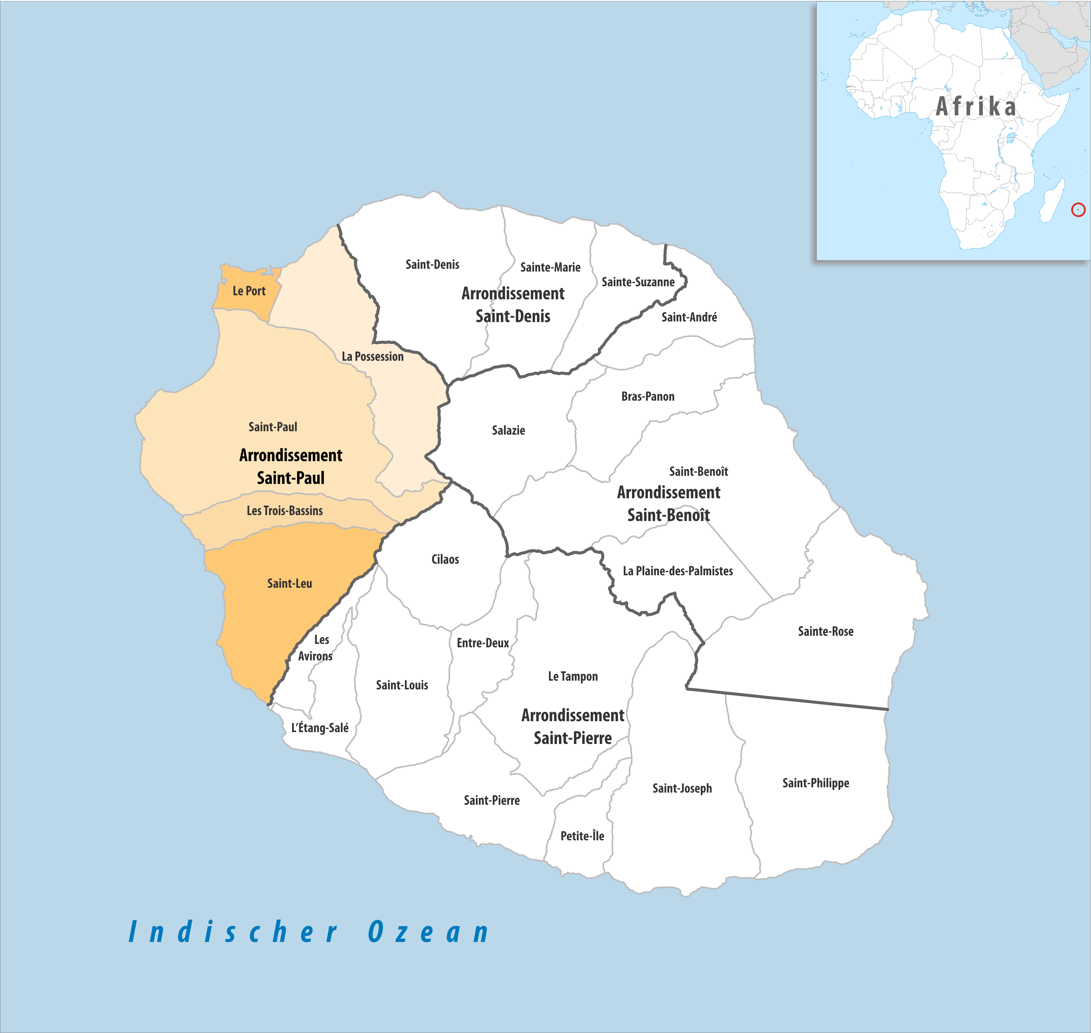 Lage des Arrondissements Saint-Paul